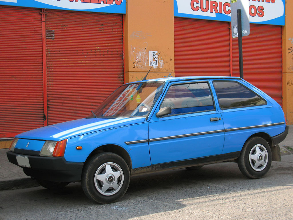 Lada Tavria 1102 1991